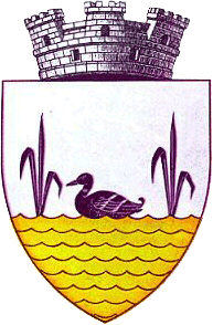 Stema oraşului Făleşti